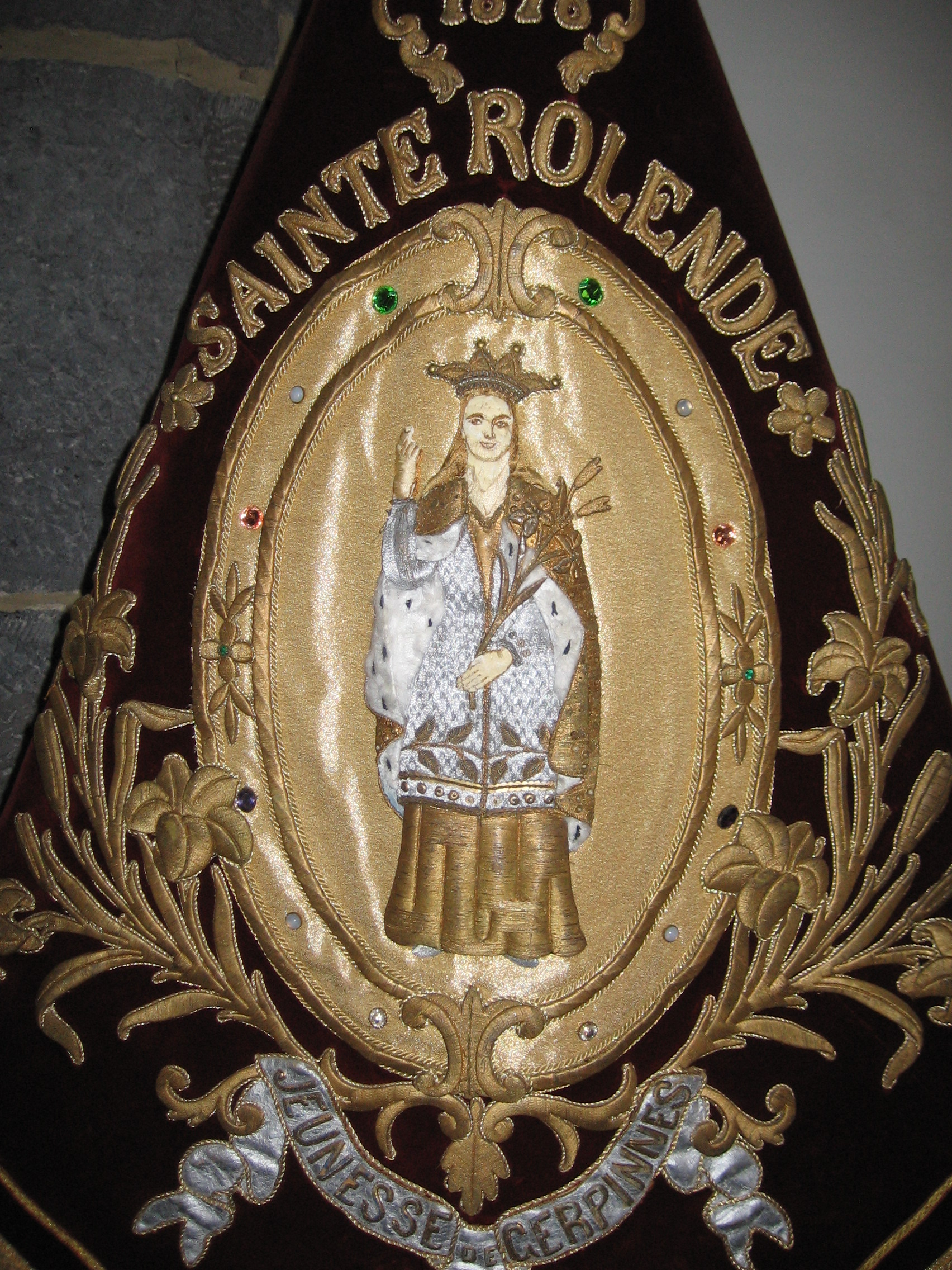 Bannière de Sainte-Rolende (jeunesse de Gerpinnes, en Belgique). Se trouve dans l'église Saint-Michel-et-Sainte-Rolende de Gerpinnes